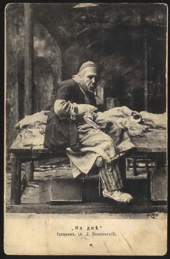 Набор открыток «Типы Горького „На дне"»